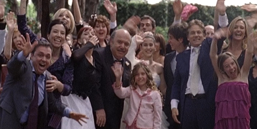 Schermata della scena finale con il cast della sesta serie Un medico in famiglia (screenshot autoprodotto)